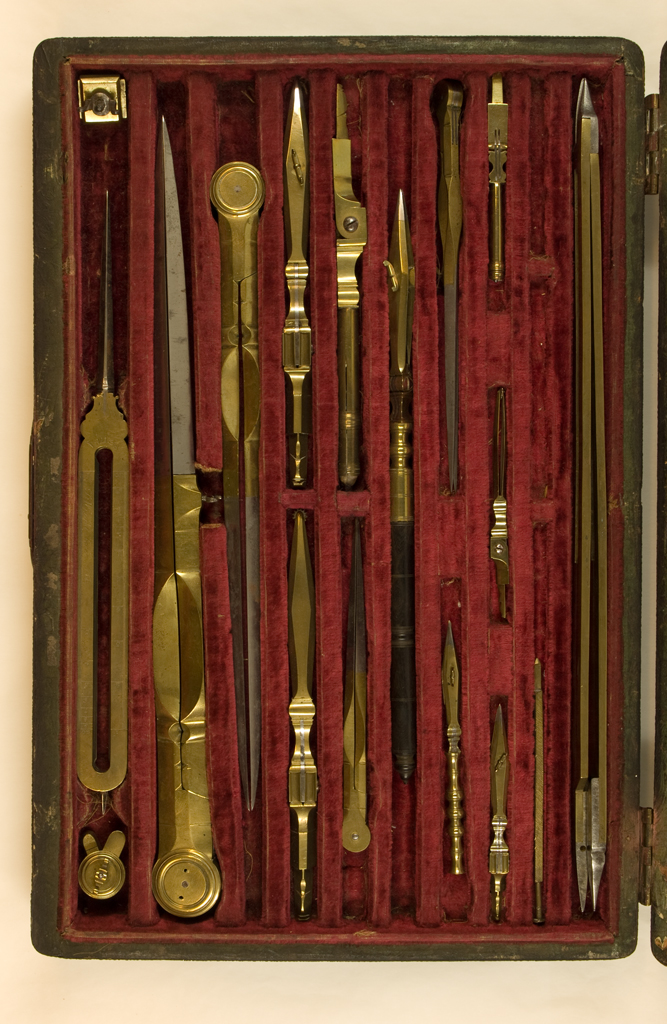 Präzisionsreißzeug. Kasten aus Holz mit Fischlederbezug, Schloss und Messingbeschlägen, innen mit rotem Samt ausgestattet. Inhalt des Kastens: 1 Parallellineal, 1 Rechenskala mit Winkelmesser, 1 Winkelmessgerät, 4 Stechzirkel, 2 Zirkel mit Stellschrauben und 9 Zubehörteile. Parallellineal: Zwei seitlich abgefasste Messungsebenen, durch vier Arme mit zentralen Scharnieren miteinander verbunden; Arme mit vegetablen Motiven graviert. Tafel aus Messing: Kanten abgefasst, beidseitig verschiedene Skalen und Tabellen zur Kursbestimmung. Proportionszirkel: Aus zwei Messingleisten auf genieteten Stahlspitzen; langer, rechteckiger Ausschnitt; die beiden Hälften werden mit einer beiliegenden Flügelschraube miteinander verbunden. Zirkel: mit beiliegender Schraube zum Feststellen, Schenkel aus zwei ovalen, abgerundeten Stücken Messing gearbeitet; daran ansetzend die Stahlspitzen. Zirkel: mit auswechselbarem Schenkel; Oberer Teil aus Messing mit eisernem Blattscharnier, unterer Teil aus Stahl, ein Schenkel durch Blattschraube befestigt, einer austauschbar. Breites nautisches Lineal: Zwei schwere Messingschienen, durch Schwenkscharnier miteinander verbunden, verschiedene Skalen zur Kursberechnung. Tuschfeder: Einsatz für den zweiteiligen Proportionszirkel, schwenkbar. Rändelrad: Einsatz für den Zirkel mit auswechselbarem Schenkel, schwenkbar. Bleistift: dient als Einsatz für den Zirkel mit auswechselbarem Schenkel, vorderer Teil als Hülse zum Einklemmen eines Bleistiftes ausgebildet. Federhalter: Gedrechseltes Heft aus Ebenholz, daran befestigt eine Tuschfeder. Kleiner Einsatz für ein Griffstück oder kleinen Zirkel, als Tuschfeder gebraucht. Kleiner Einsatz, als Tuschfeder gebraucht. Kleiner Bleistifteinsatz, als Tuschfeder gebraucht. Kleiner Bleistifteinsatz (Länge 8cm), kleiner Bleistifteinsatz (Länge 9cm). Stäbchenförmiges Instrument aus Messing, Funktion unbekannt